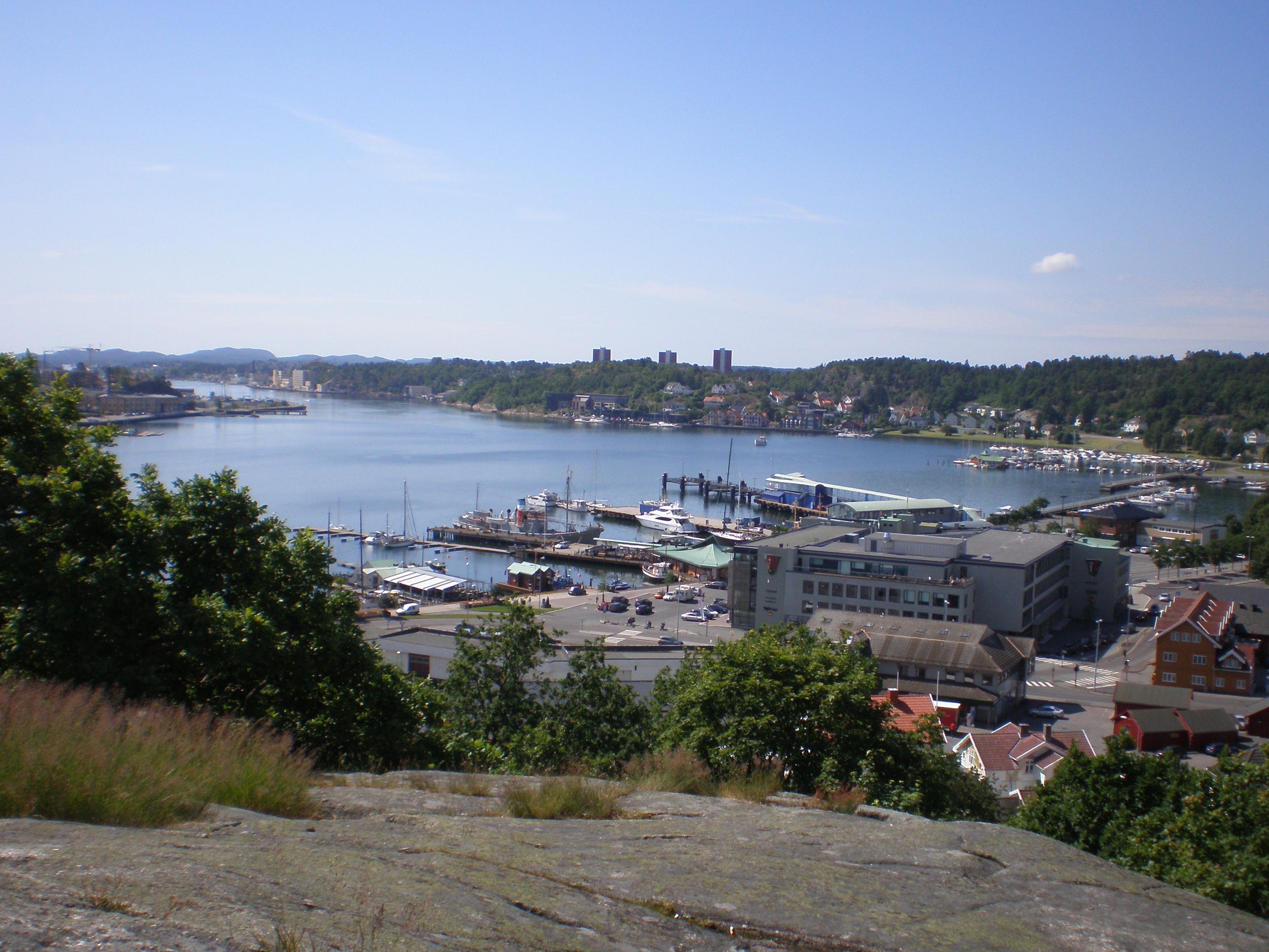 Sandefjord, Norwegia